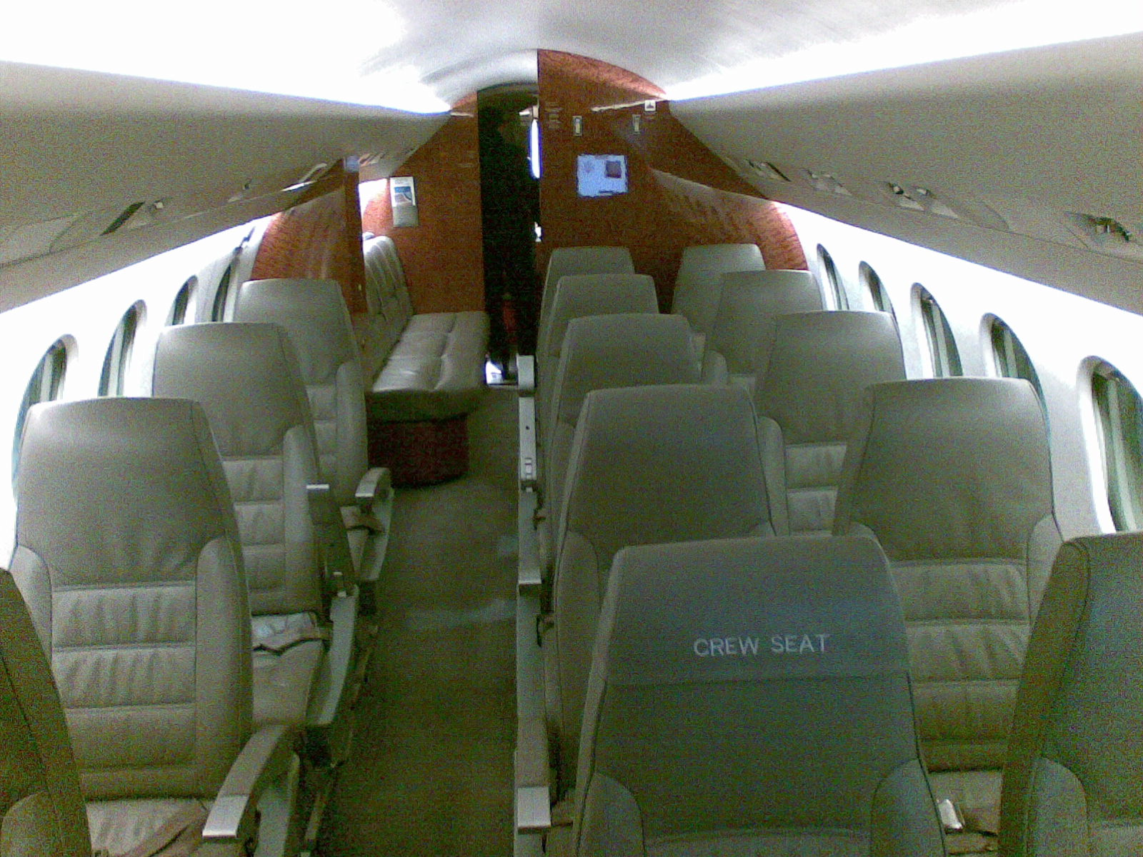 D-AZEM Kabine